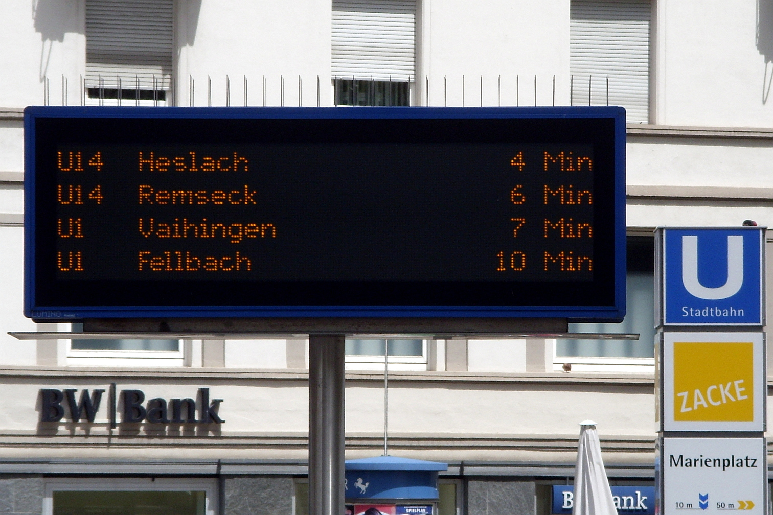 Dynamischer Fahrgastinformationsanzeiger der Stadtbahn Stuttgart